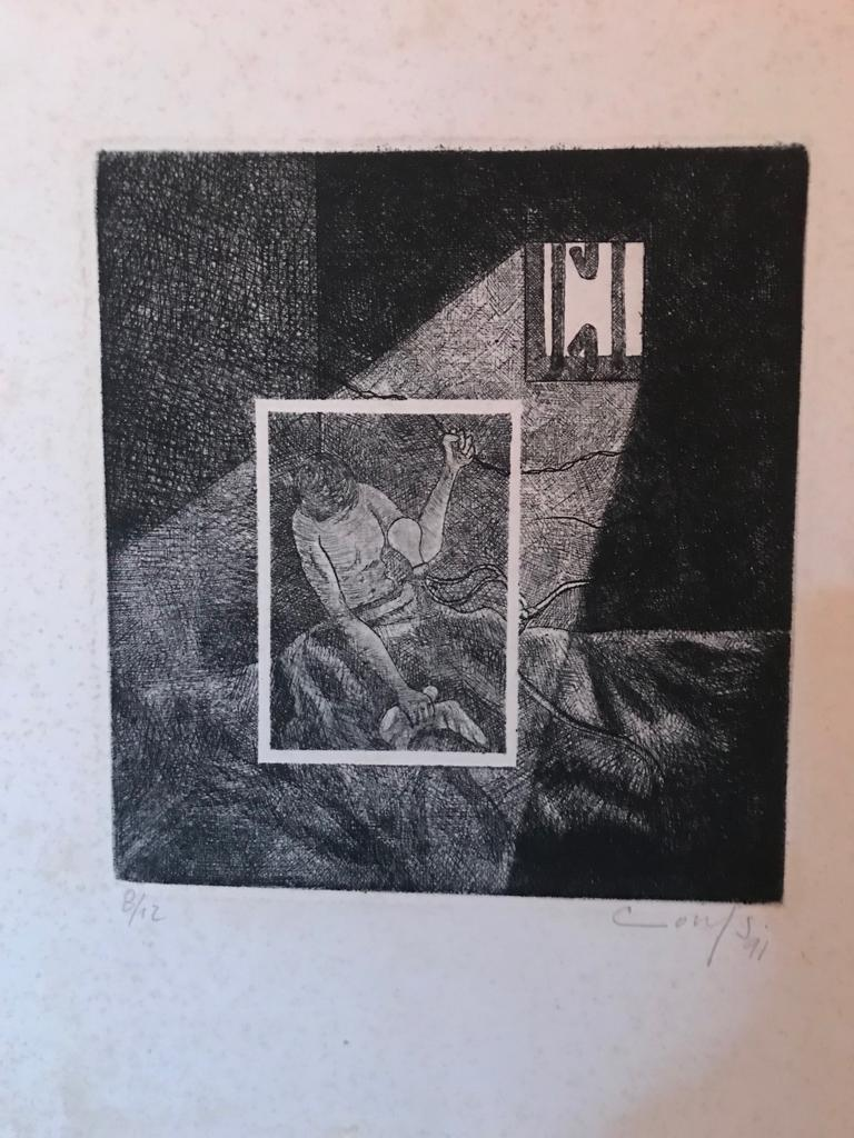 Serigrafía realizada por Carlos León Mejías en los años 80. Poeta barinés-Venezuela.